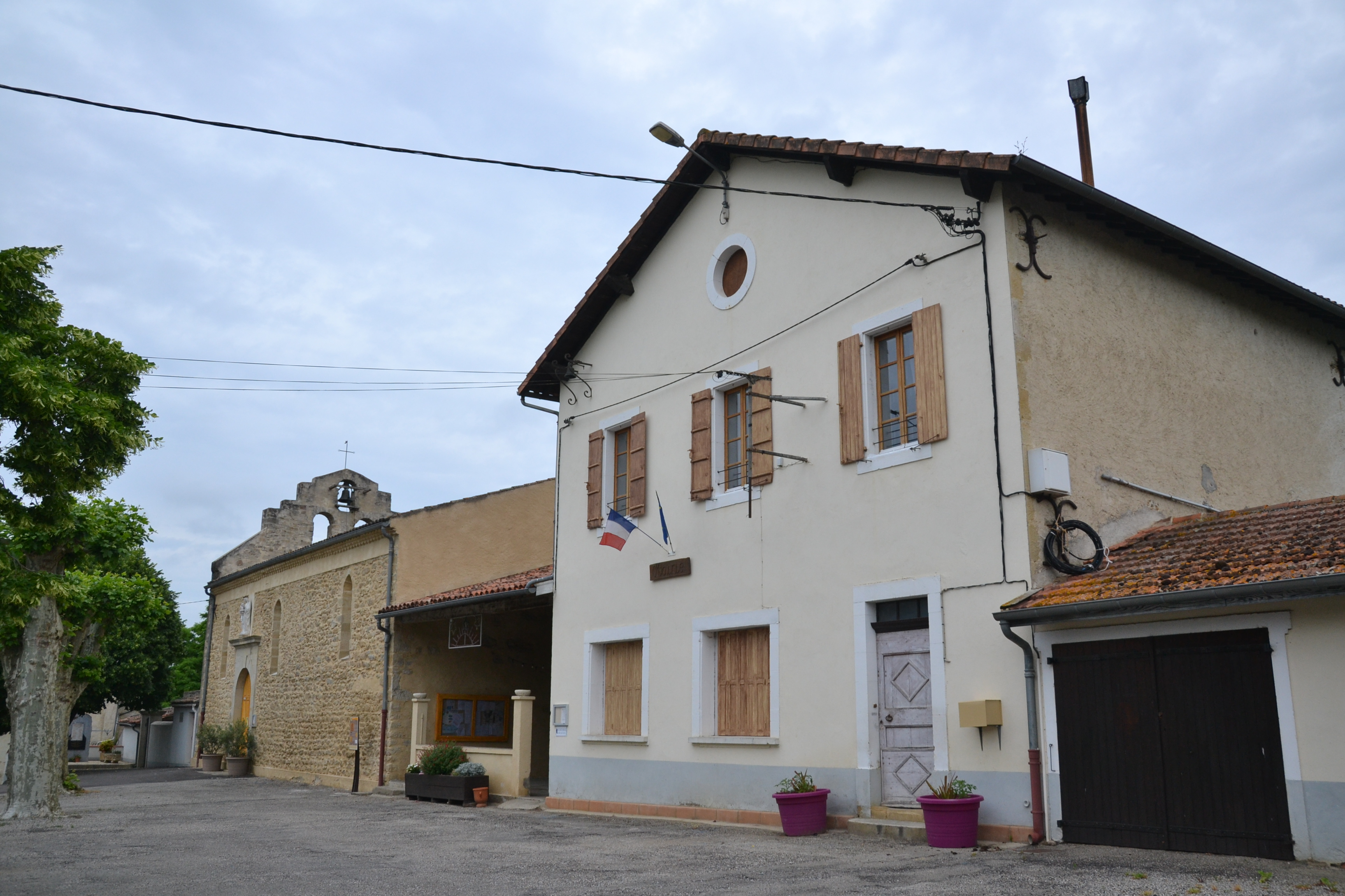 L'église Notre-Dame et la mairie de Besset (Ariège, France).